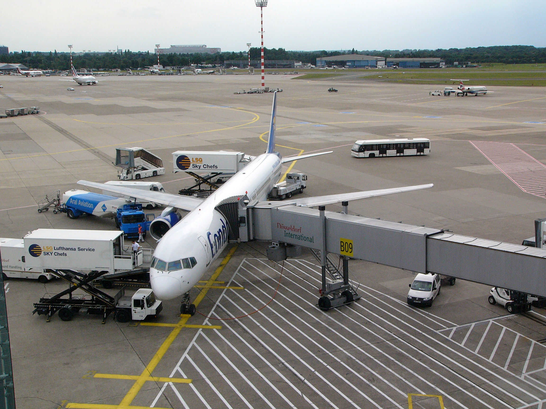 Panasonic DMC-FZ10